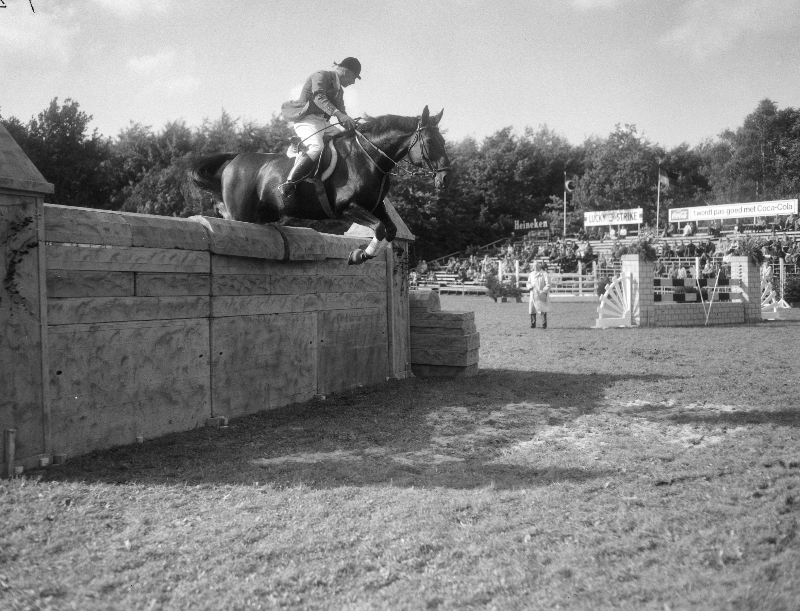 Collectie / Archief : Fotocollectie Anefo Reportage / Serie : Concours Hippique te Rotterdam Beschrijving : Hauke Schmidt op het paard Gerona won in de barrage (prijs van de Haven) Datum : 2 september 1966 Locatie : Rotterdam, Zuid-Holland Trefwoorden : concoursen, paardensport, sport Persoonsnaam : Schmidt, Hauke Fotograaf : Bilsen, Joop van / Anefo Auteursrechthebbende : Nationaal Archief Materiaalsoort : Negatief (zwart/wit) Nummer archiefinventaris : bekijk toegang 2.24.01.04 Bestanddeelnummer : 919-5221